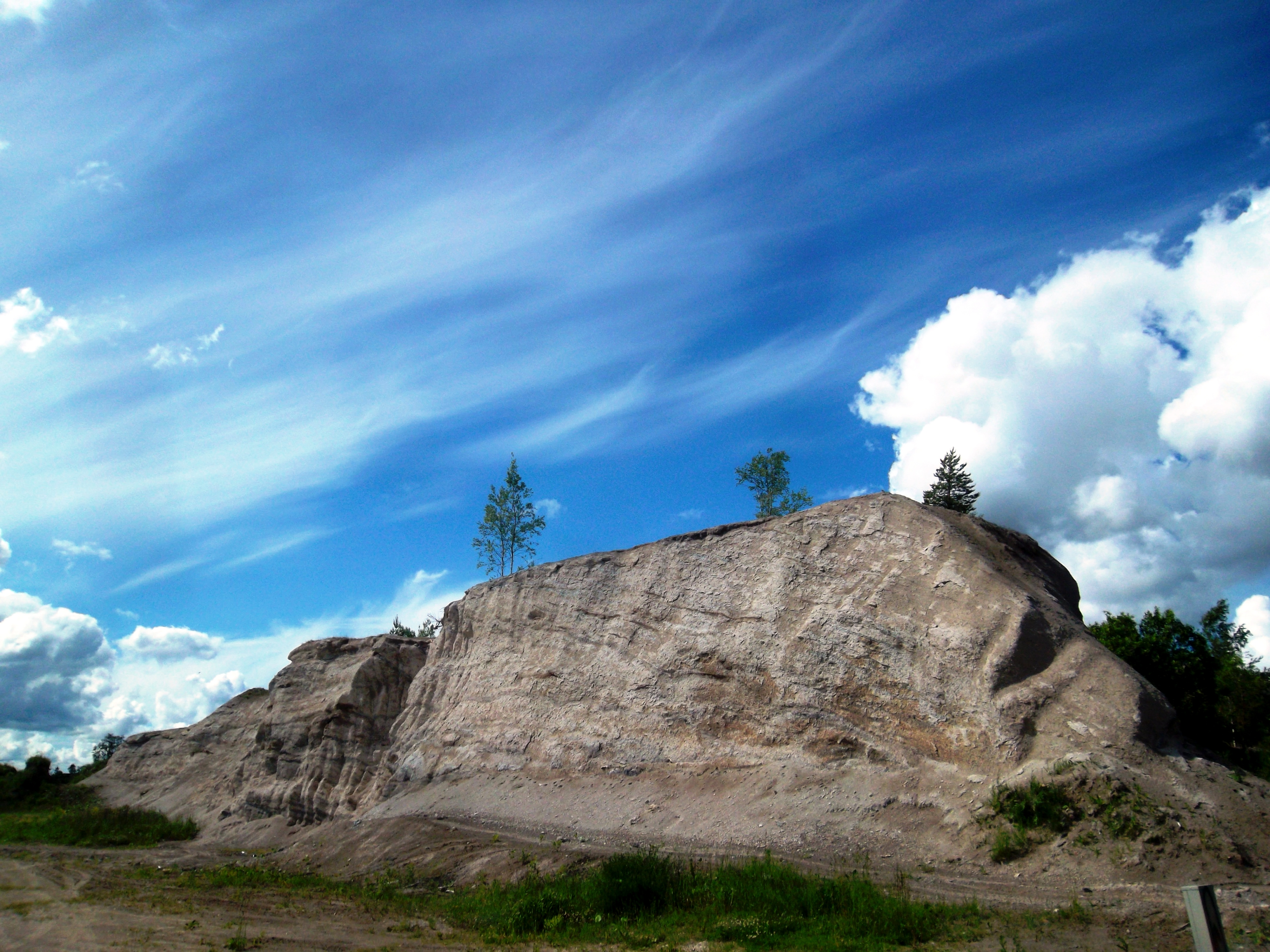 Вид на зольную гору в Кохила.